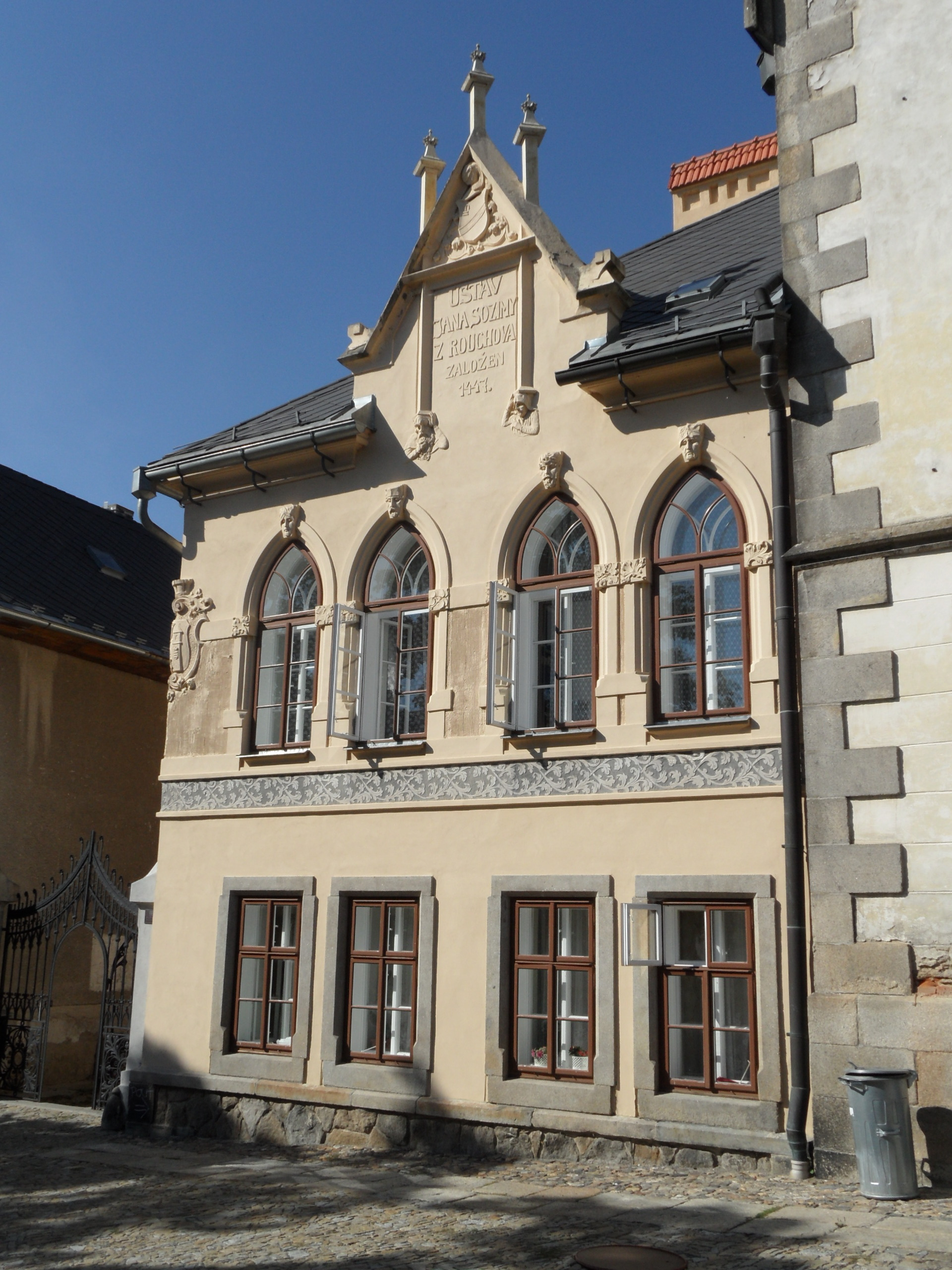 Špitál, Sezimovo nám. 7, Polná